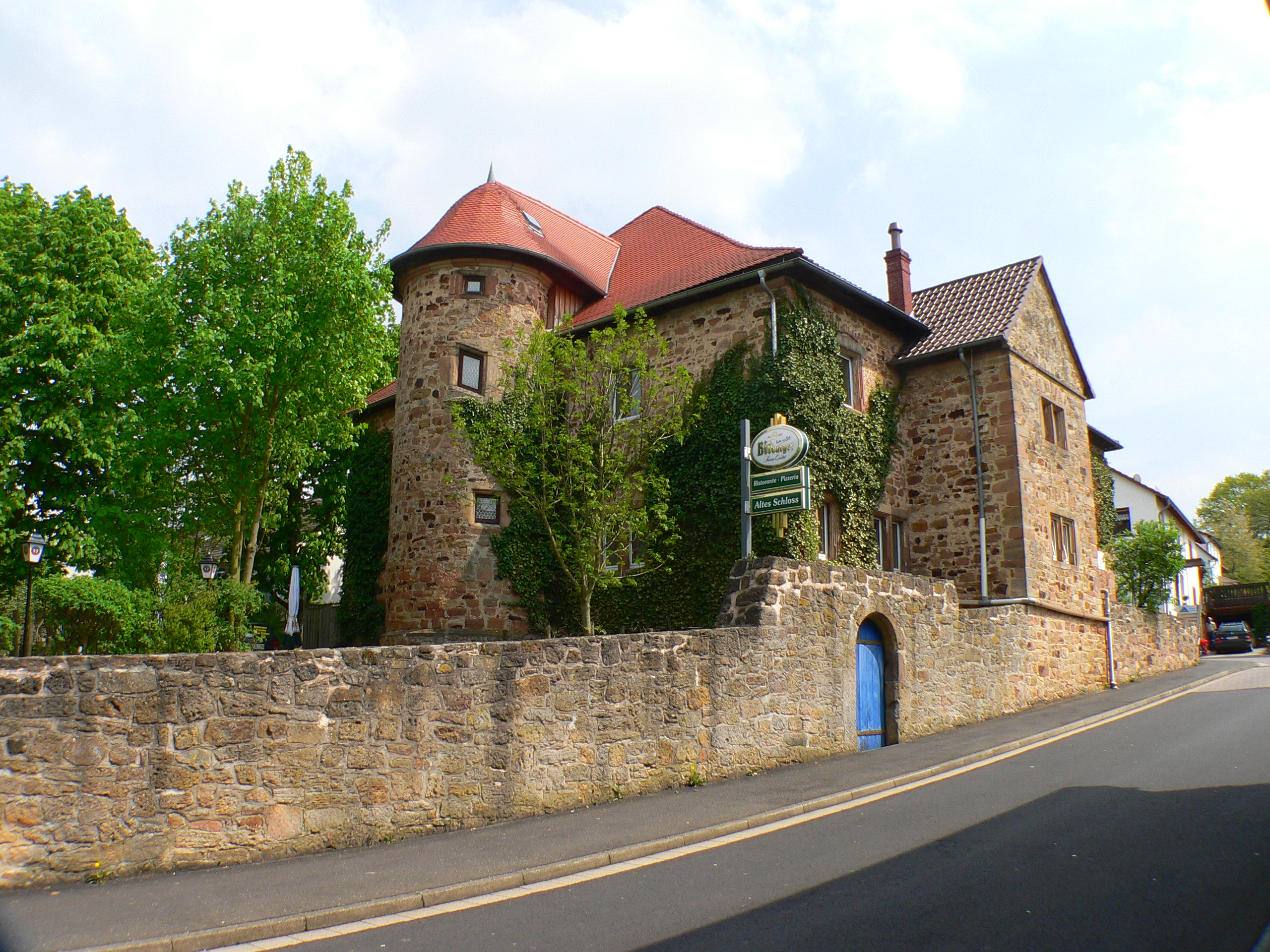 Altes Burghaus Schrecksbach in Schrecksbach, Hessen, Regierungsbezirk Kassel, Schwalm-Eder-Kreis - Straßenansicht